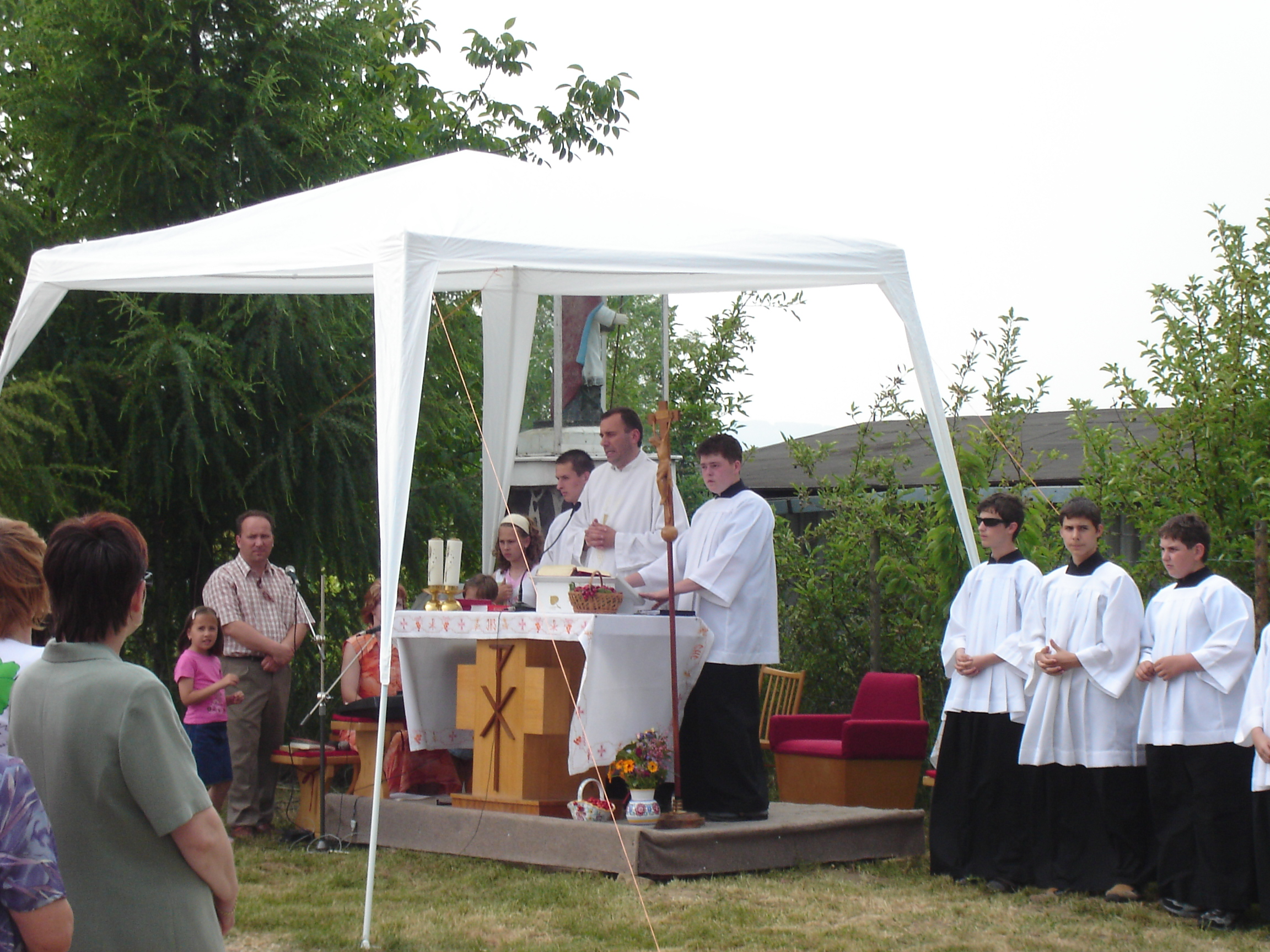 Urbanko